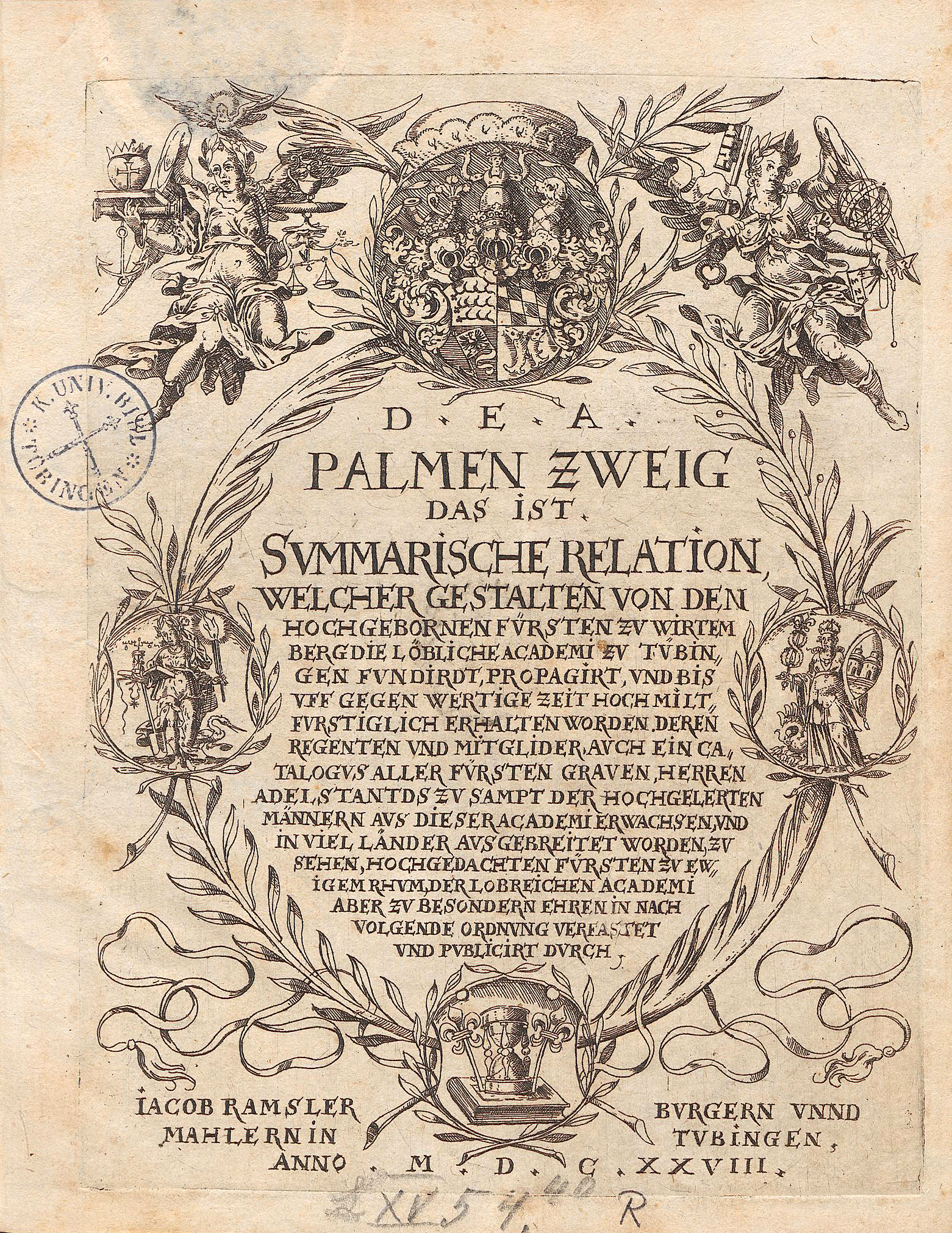 Titelseite des Bandes Palmen Zweig, das ist Svmmarische Relation, welcher Gestalten von den hochgebornen Fürsten zu Wirtemberg die löbliche Academi zu Tübingen fundirdt, propagirt und bis uff gegen wertige Zeit hoch miltfürstiglich erhalten worden, deren Regenten und Mitglieder: auch ein Catalogus aller Fürsten, Graven, Herren, Adelstantds zu sampt der hochgelerten Männern aus dieser Academi erwachsen, und in viel Länder ausgebreitet worden, zu sehen, hochgedachten Fürsten zu ewigem Rhum, der lobreichen Academi aber zu besondern Ehren in nachvolgende Ordnung verfasset vnd publicirt durch Iacob Ramsler, Burgern vnd Mahlern in Tübingen, Tübingen 1628 (Radierung)